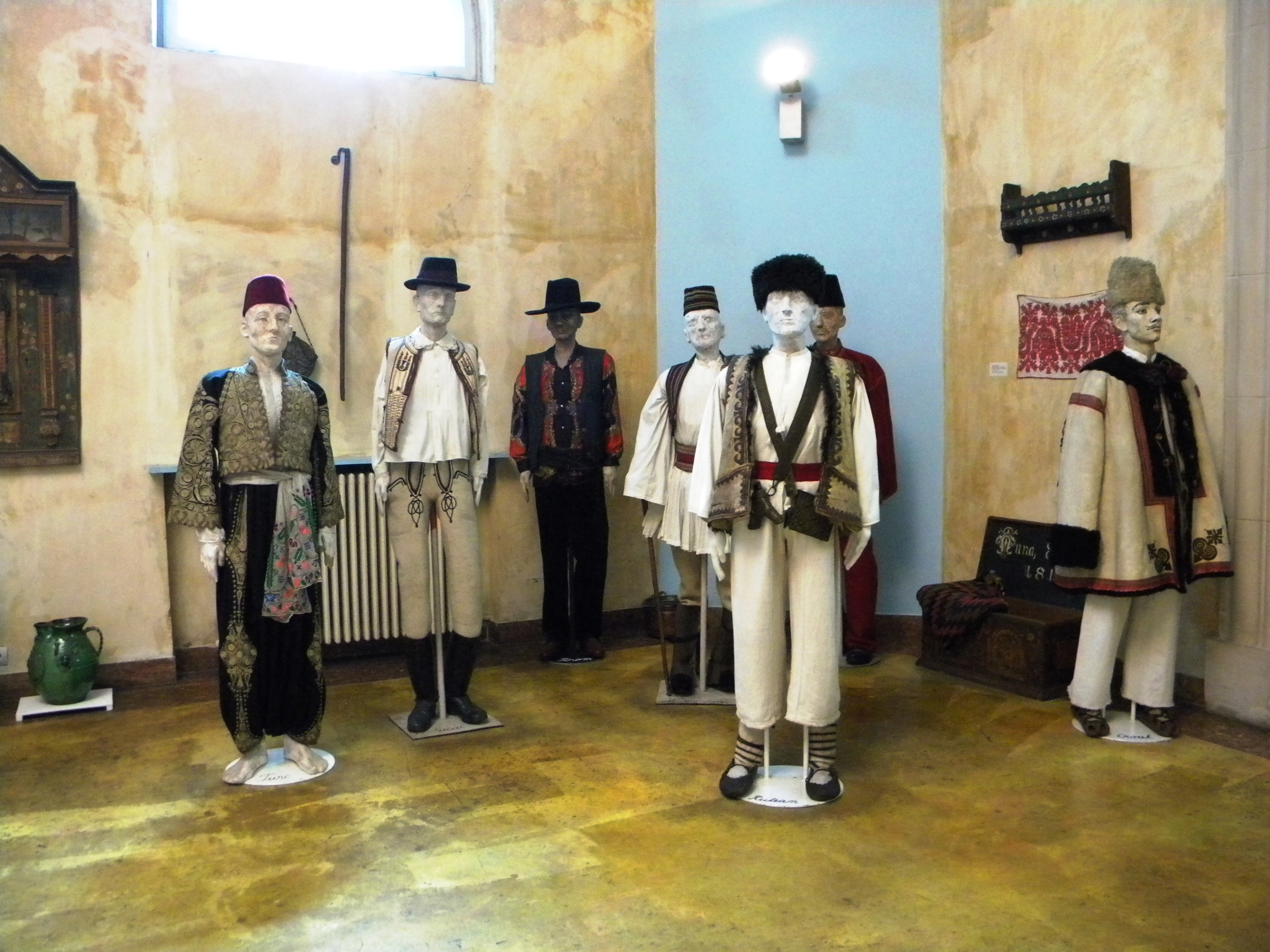 Bucuresti, Romania, Muzeul Taranului Roman (interior 38)(costume populare barbatesti)(2); B-II-m-A-18985